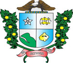 Brasao-pesqueira-pernambuco